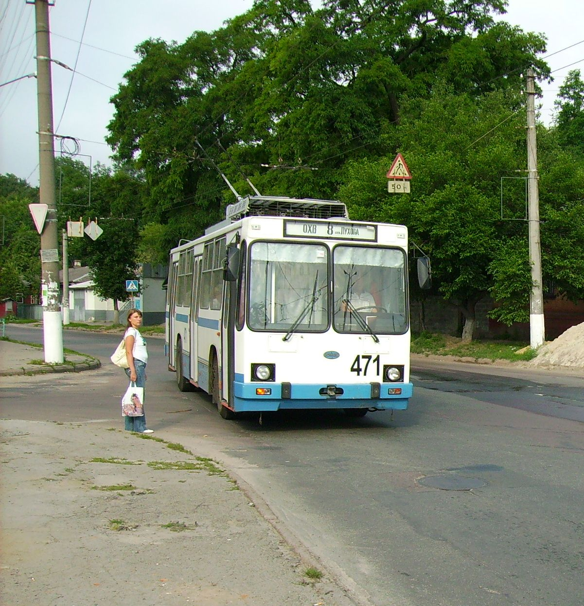 Троллейбус марки ЮМЗ-Т2 на улице Толстого в Чернигове